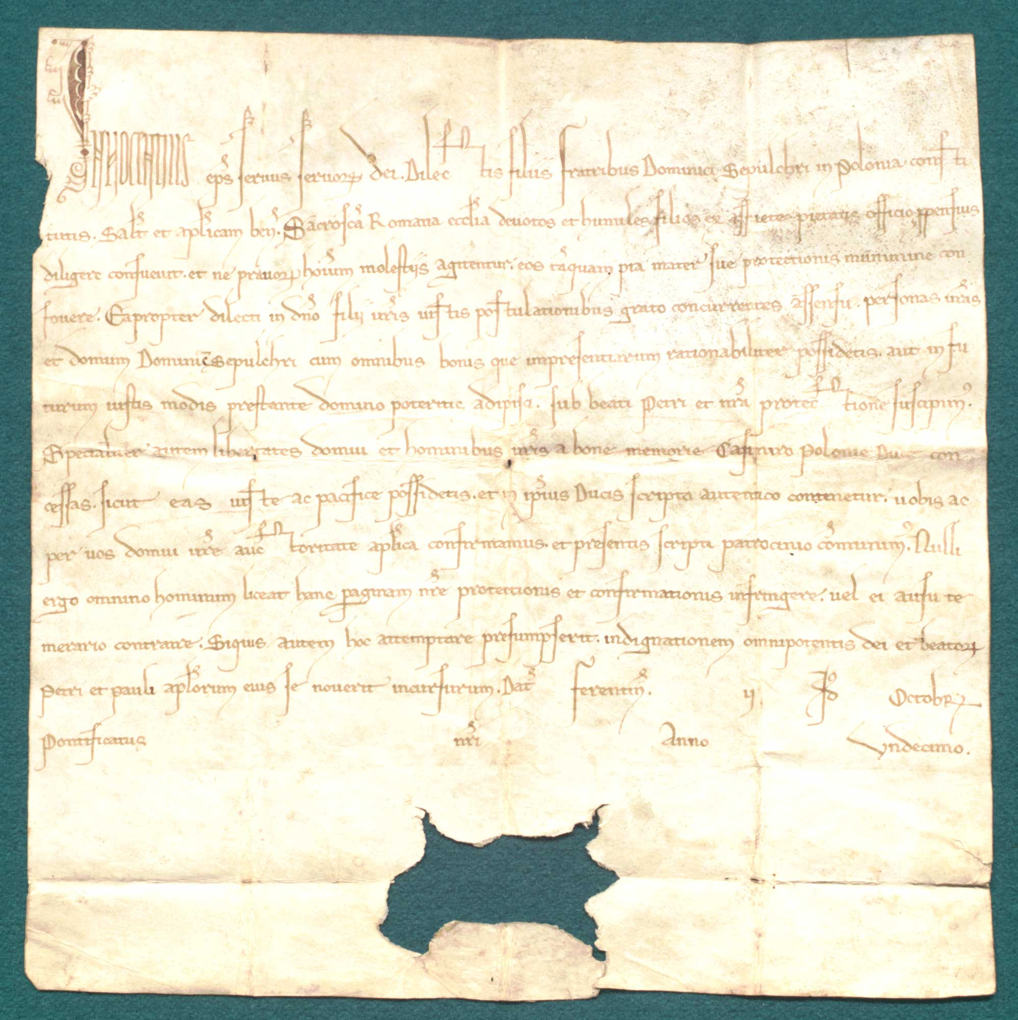 Innocenty III, papież, potwierdza bożogrobcom w Miechowie nadanie Kazimierza Sprawiedliwego i przyjmuje klasztor pod swoją opiekę. Język: łacina, Opis zewnętrzny: oryg., 1 k. pergaminowa, 21,2 x 18,8 + 2,6 cm; brak bulli